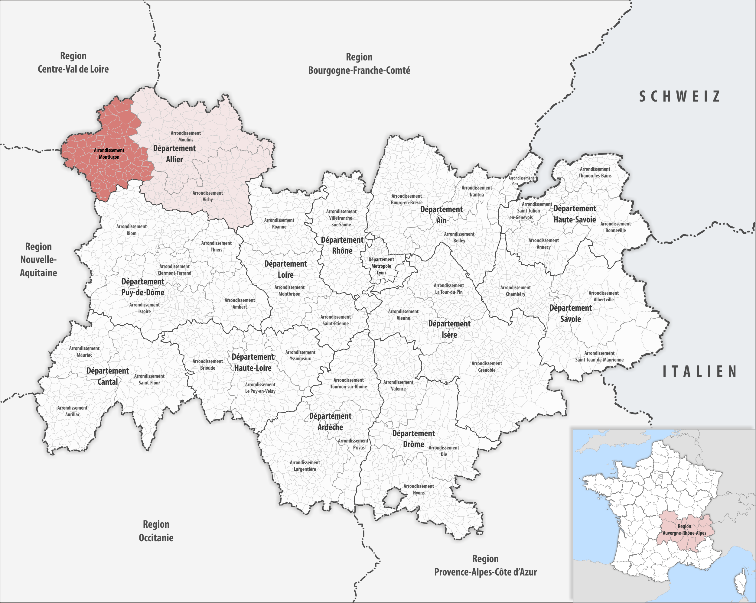 Lage des Arrondissements Montluçon